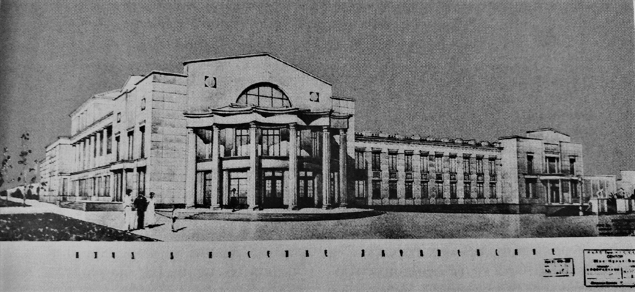 Архитектурный проект Народного дома (Дворца культуры) в г. Приволжске. Архитектор А.И. Панов.